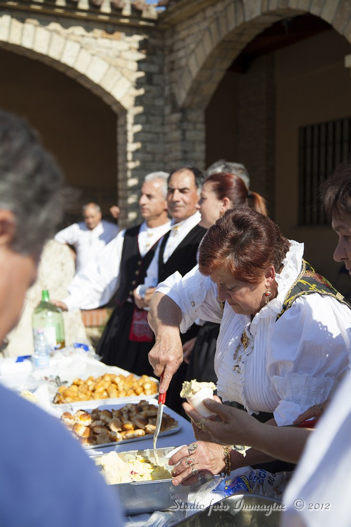 Sagra dello zafferano a Villanovafranca, in Sardegna – Italia.